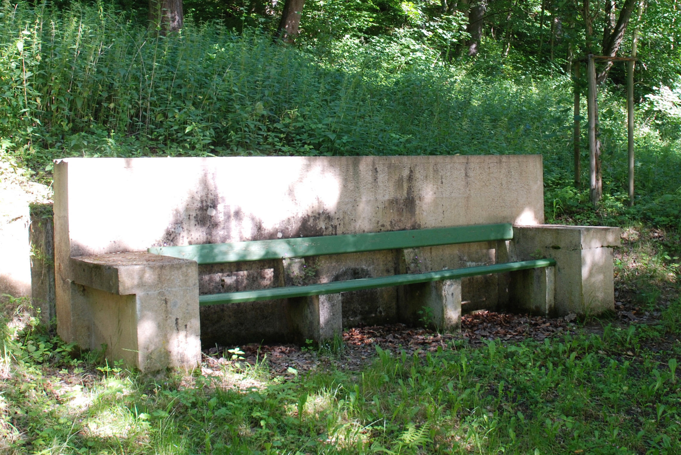 Lavička Allschlaraffia v Karlových Varech za letním kinem